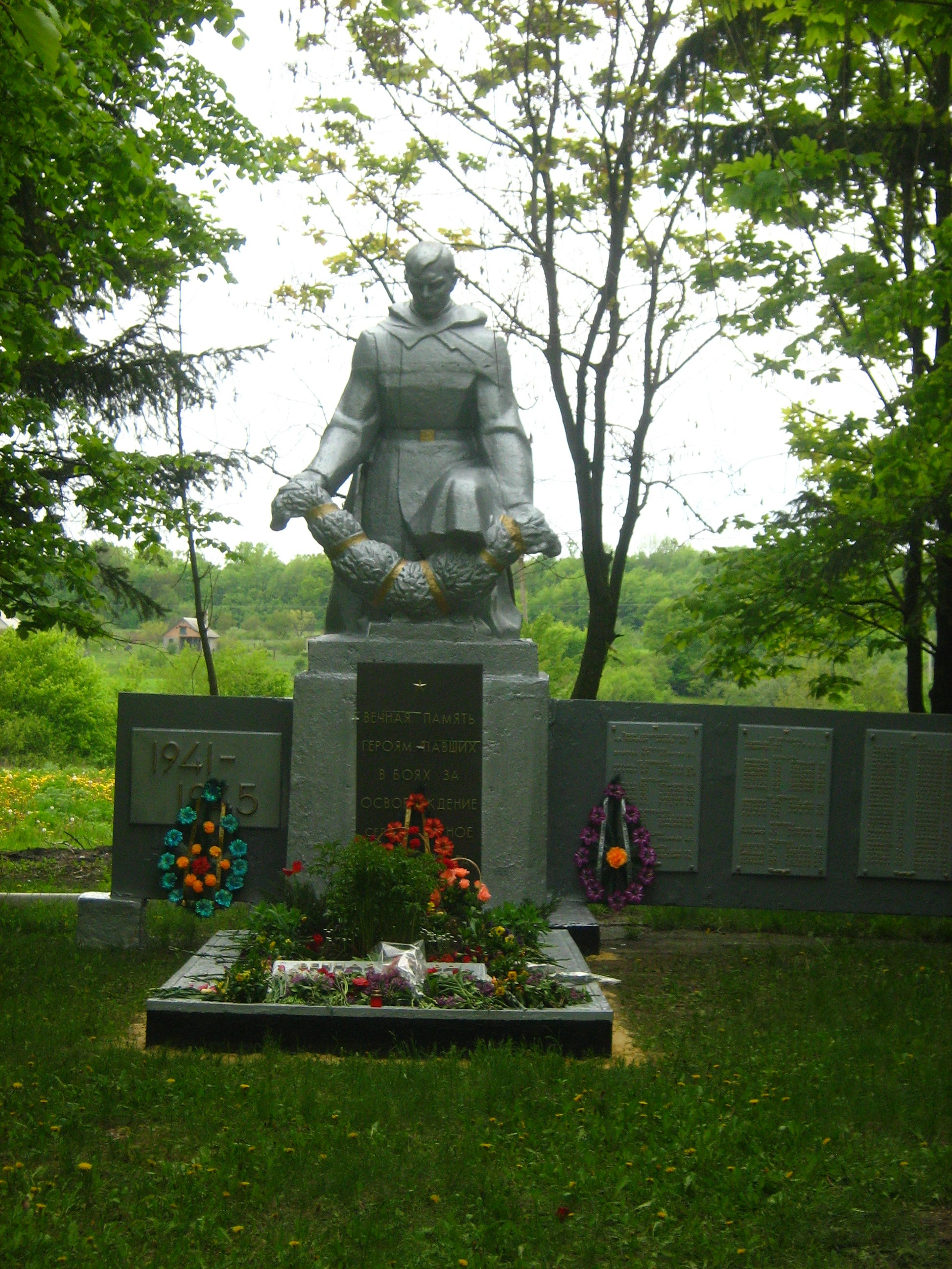 Братская могила в селе Зарожное Чугуевского района Харьковской области